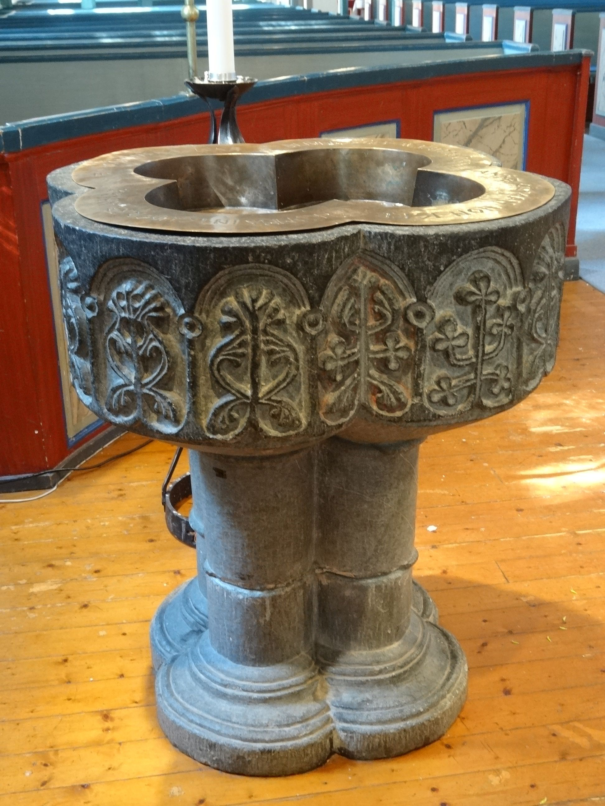 Dopfunt från Vallda kyrka i norra Halland.